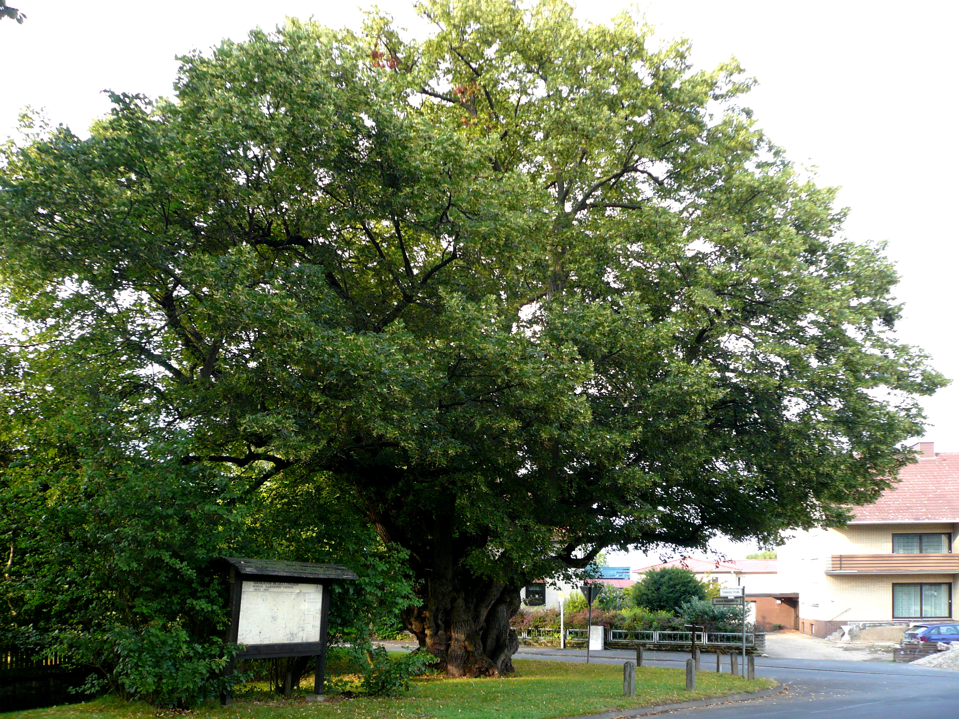 Angeblich im 15. Jahrhundert gepflanzte Linde in Elliehausen, Stadt Göttingen, Niedersachsen.